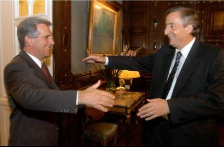 Tabaré Vázquez y Néstor Kirchner acuerdan crear una Comisión Binancional para solucionar el conflicto de las plantas de celulosa sobre el Río Uruguay.